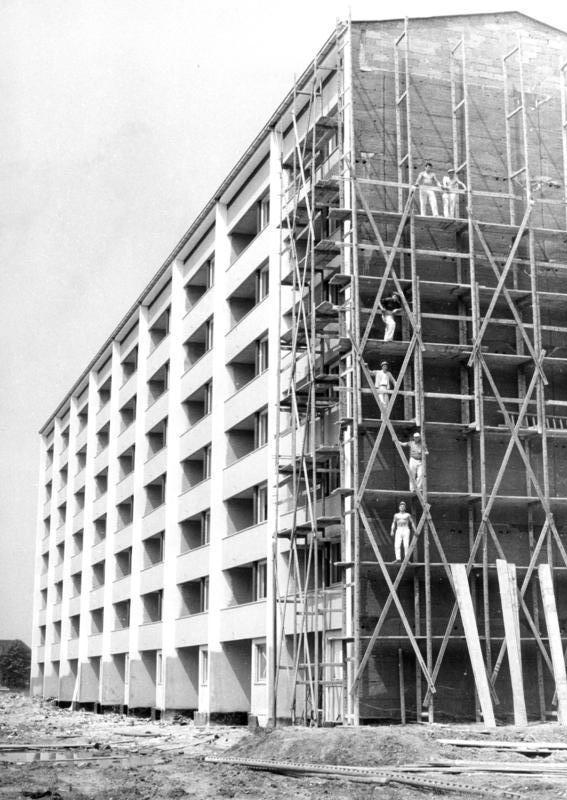 Wohnungsbau 1961 in Duisburg-Rheinhausen